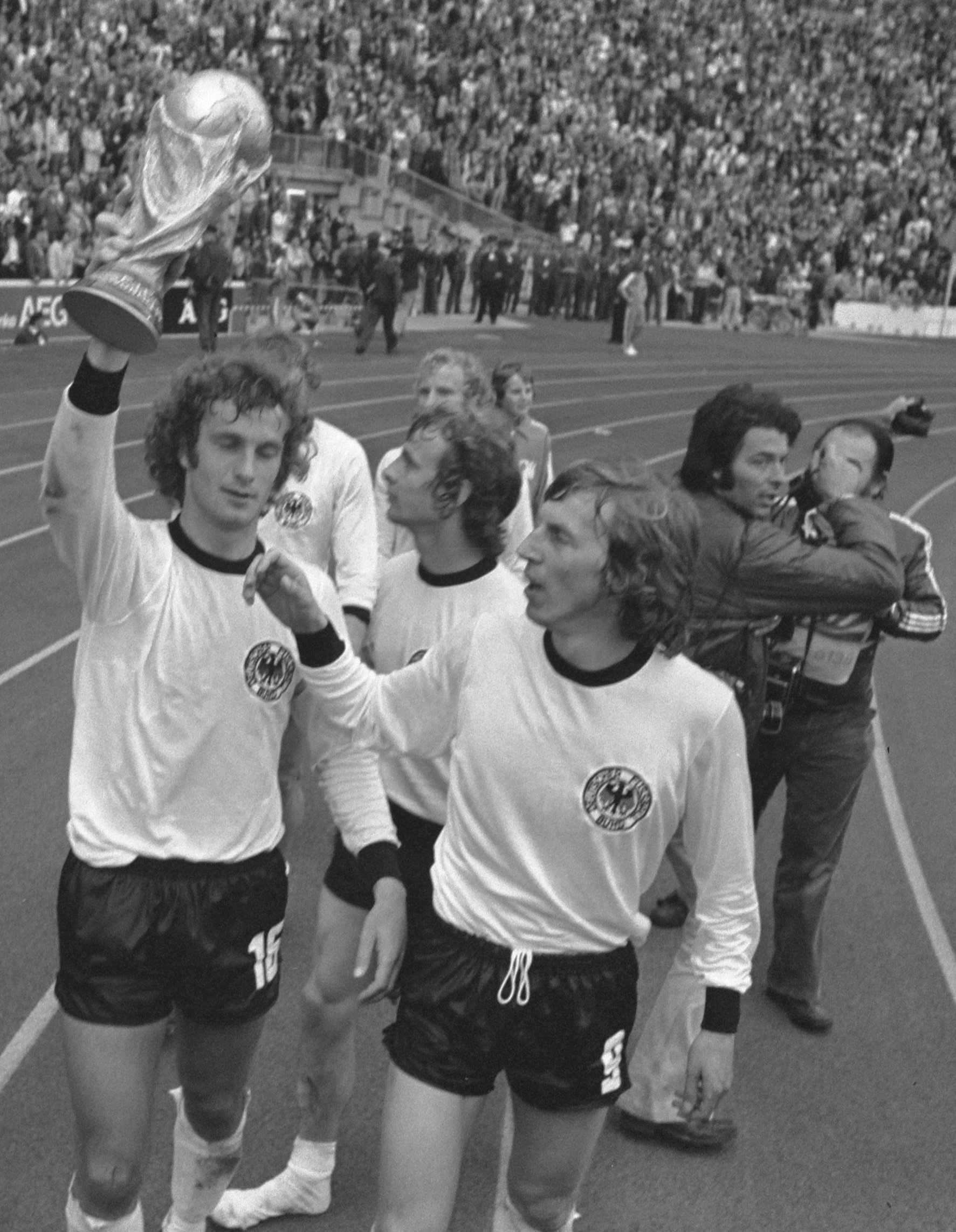 Collectie / Archief : Fotocollectie Anefo Reportage / Serie : [ onbekend ] Beschrijving : Finale wereldkampioenschap voetbal 1974 in Munchen, West Duitsland tegen Nederland 2-1; Duitse spelers met de wereldbeker Datum : 7 juli 1974 Locatie : München, Nederland, West-Duitsland Trefwoorden : SPELERS, finales, sport, voetbal, wereldkampioenschappen Fotograaf : Verhoeff, Bert / Anefo Auteursrechthebbende : Nationaal Archief Materiaalsoort : Negatief (zwart/wit) Nummer archiefinventaris : bekijk toegang 2.24.01.05 Bestanddeelnummer : 927-3099 Reacties Geplaatst door eduardo op 24 juli 2012 - 16:03. HI! dont you have any wc final photo in color?? Thanks! Geplaatst door Nationaal Archief op 08 augustus 2012 - 13:36. No, not in our internet image bank. You could send a request to our partners of Spaarnestad photo to look in their offline catalogue.